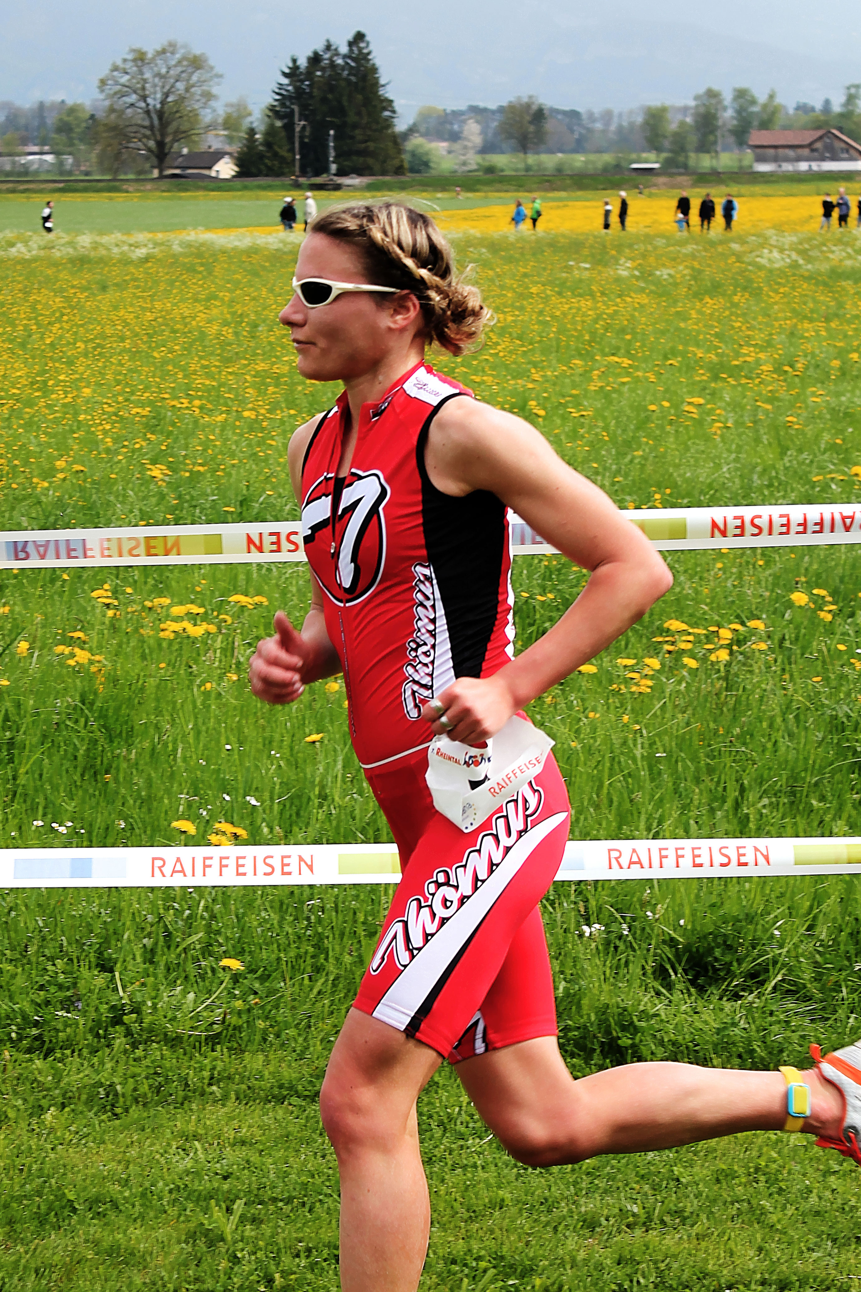 Martina Krähenbühl beim Rheintal Duathlon 2013